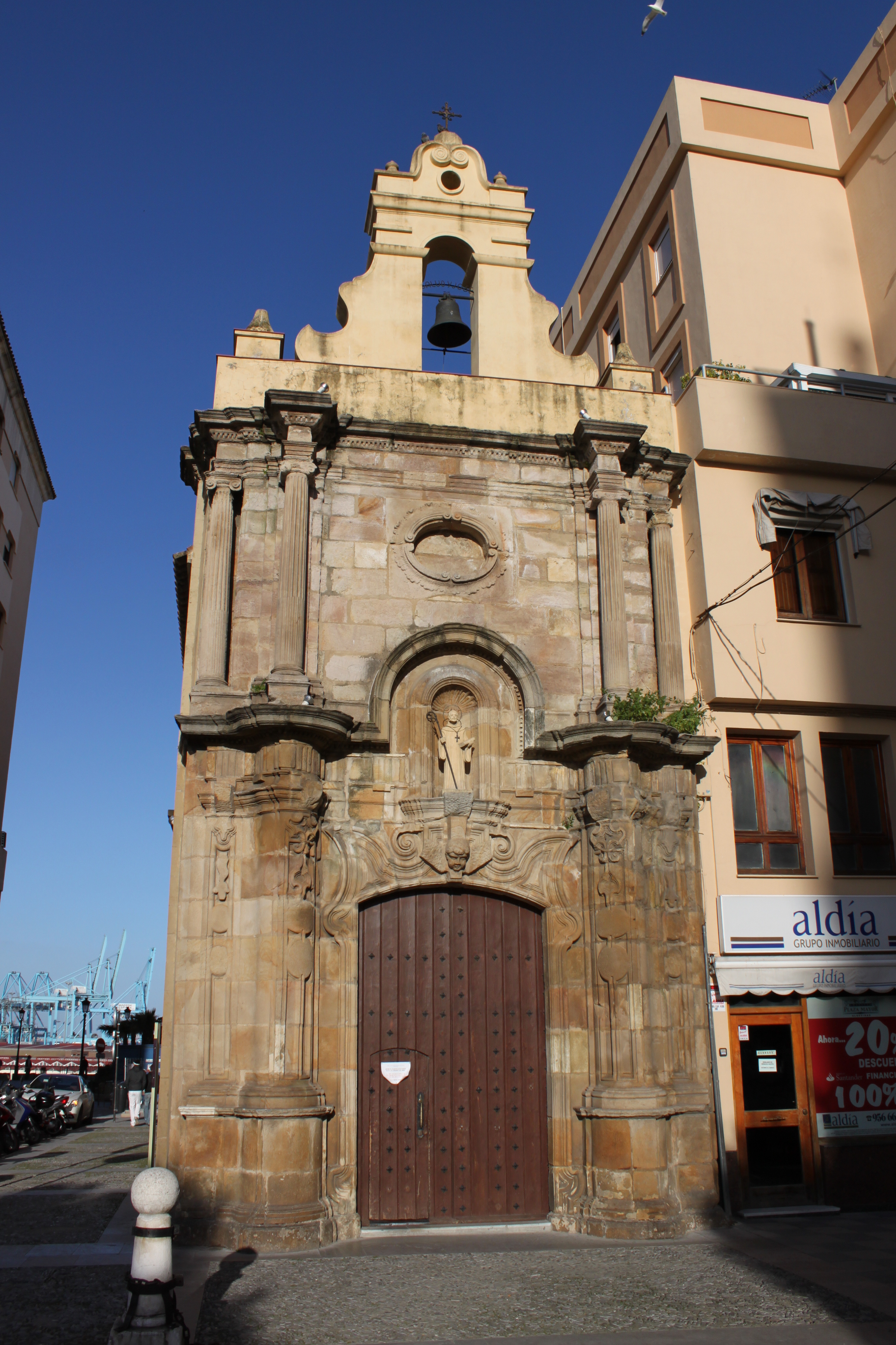 Capilla de Nuestra Señora de Europa en la localidad andaluza de Algeciras (España)